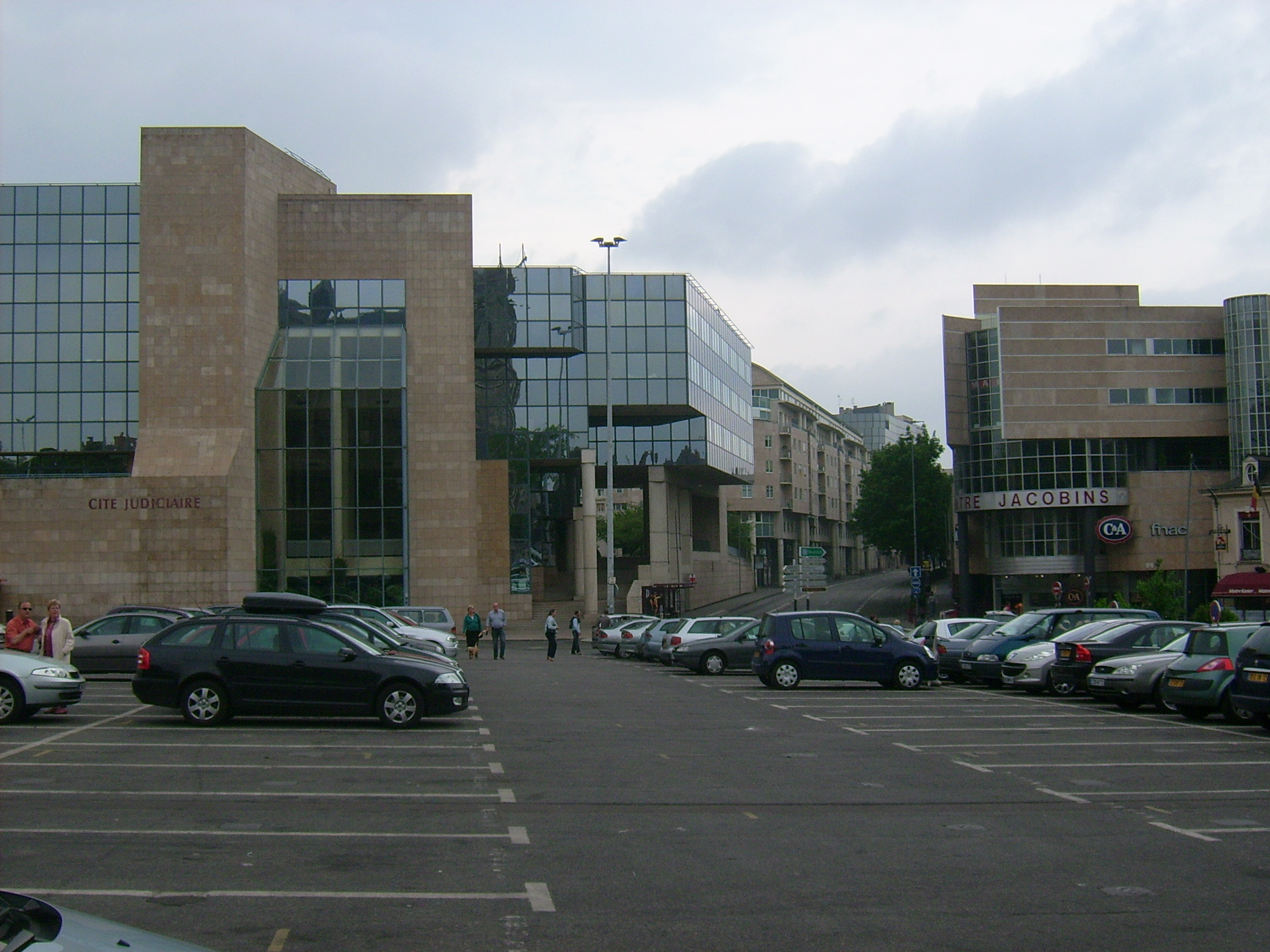 La cité judiciaire et le centre commercial Etoile-Jacobins au Mans